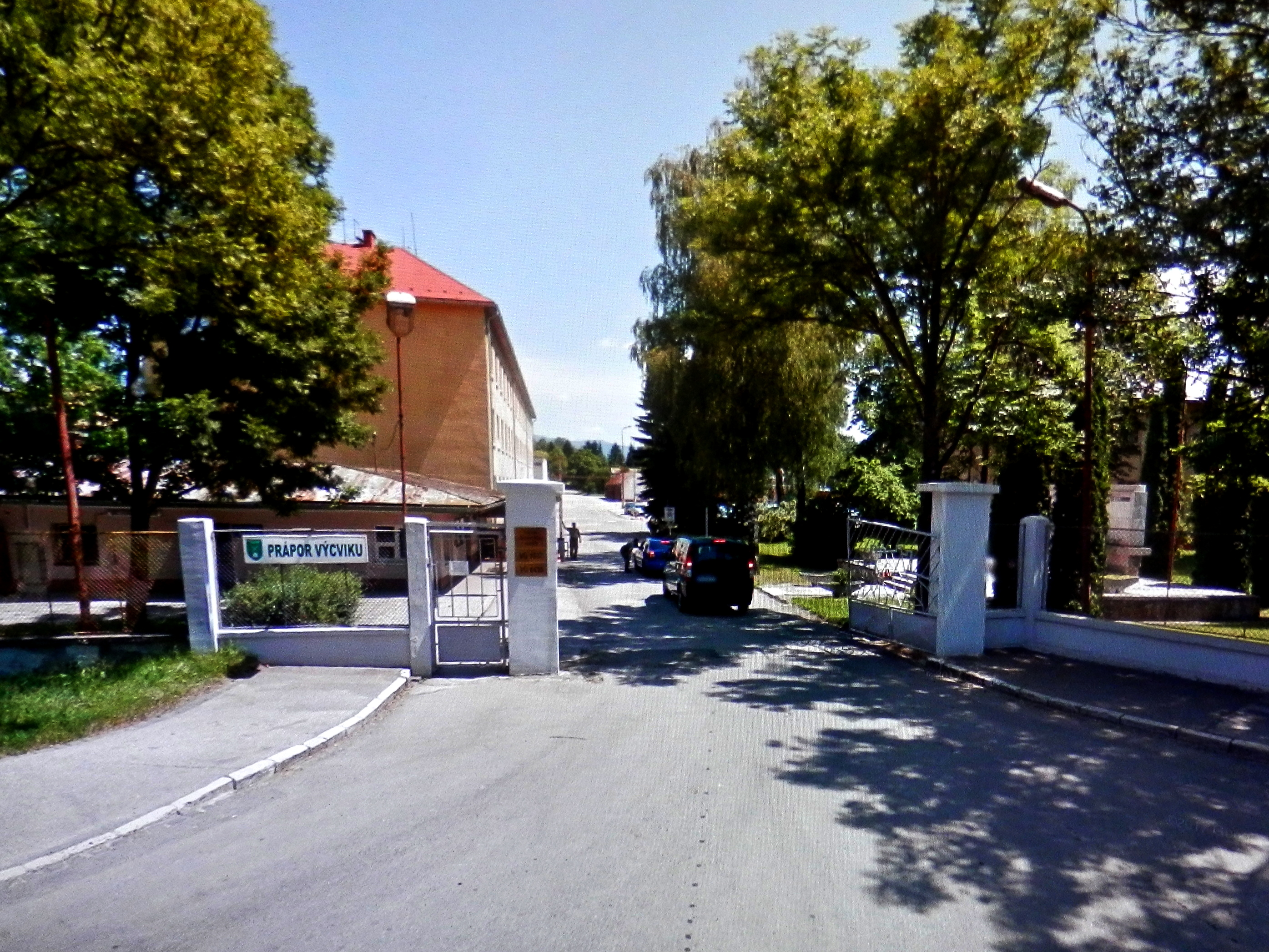 Hlavný vchod do bývalej vojenskej školy VDU v Martine. Československo.